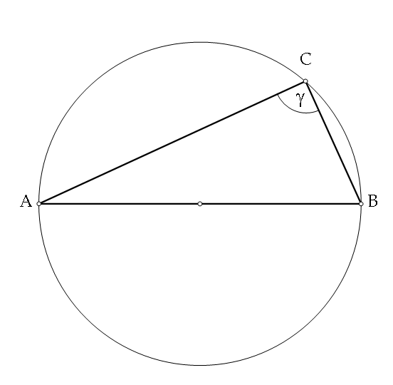 Thalész-tétel magyarázó ábrája